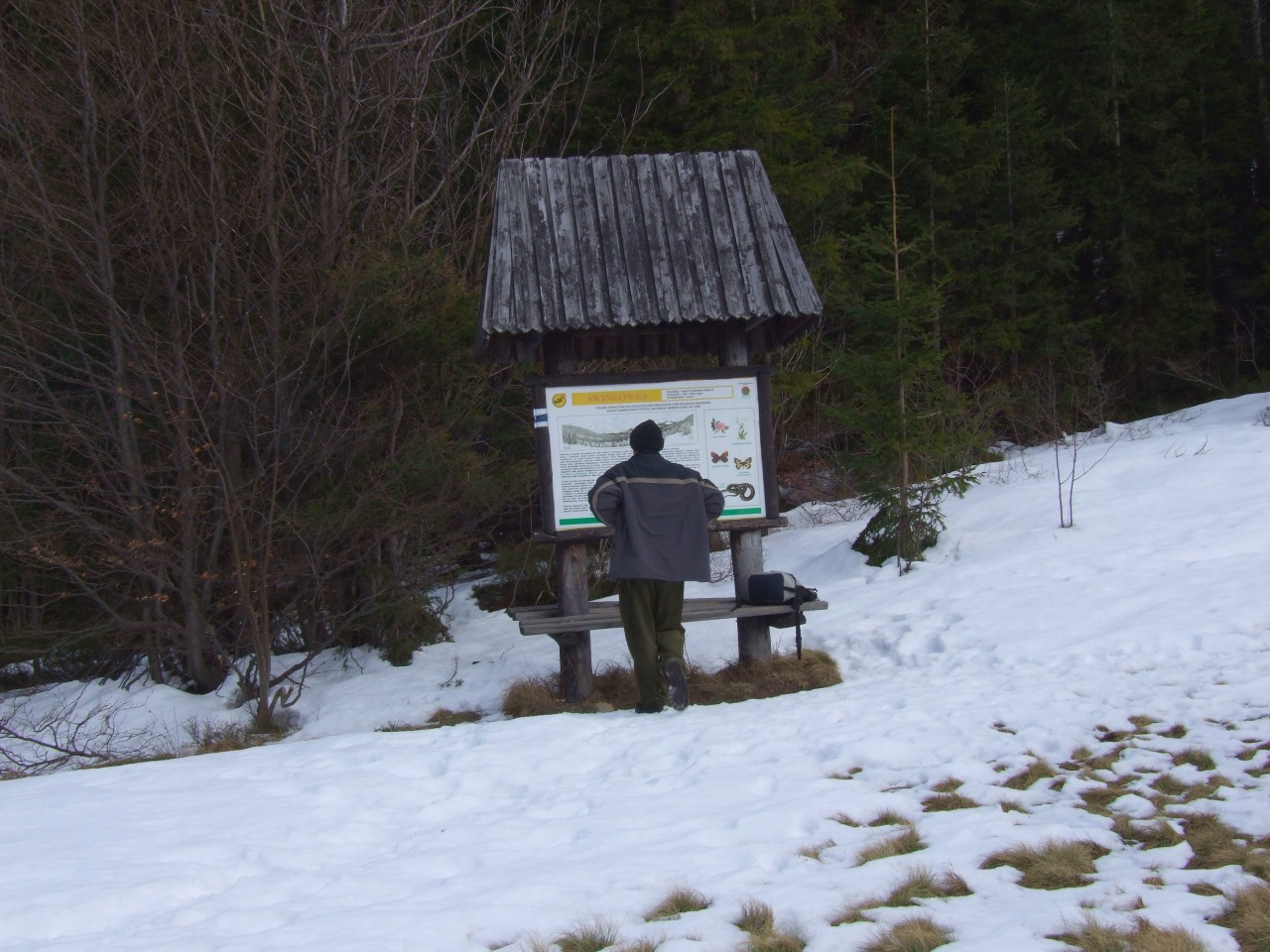 Polana Świnkówka w Gorcach